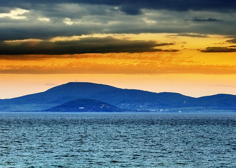 Автор: Евгени Динев. Източник: [1]